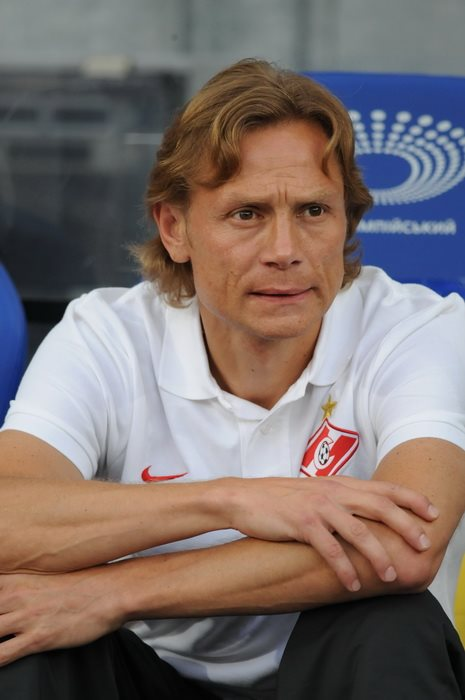 Динамо 2:1 Спартак